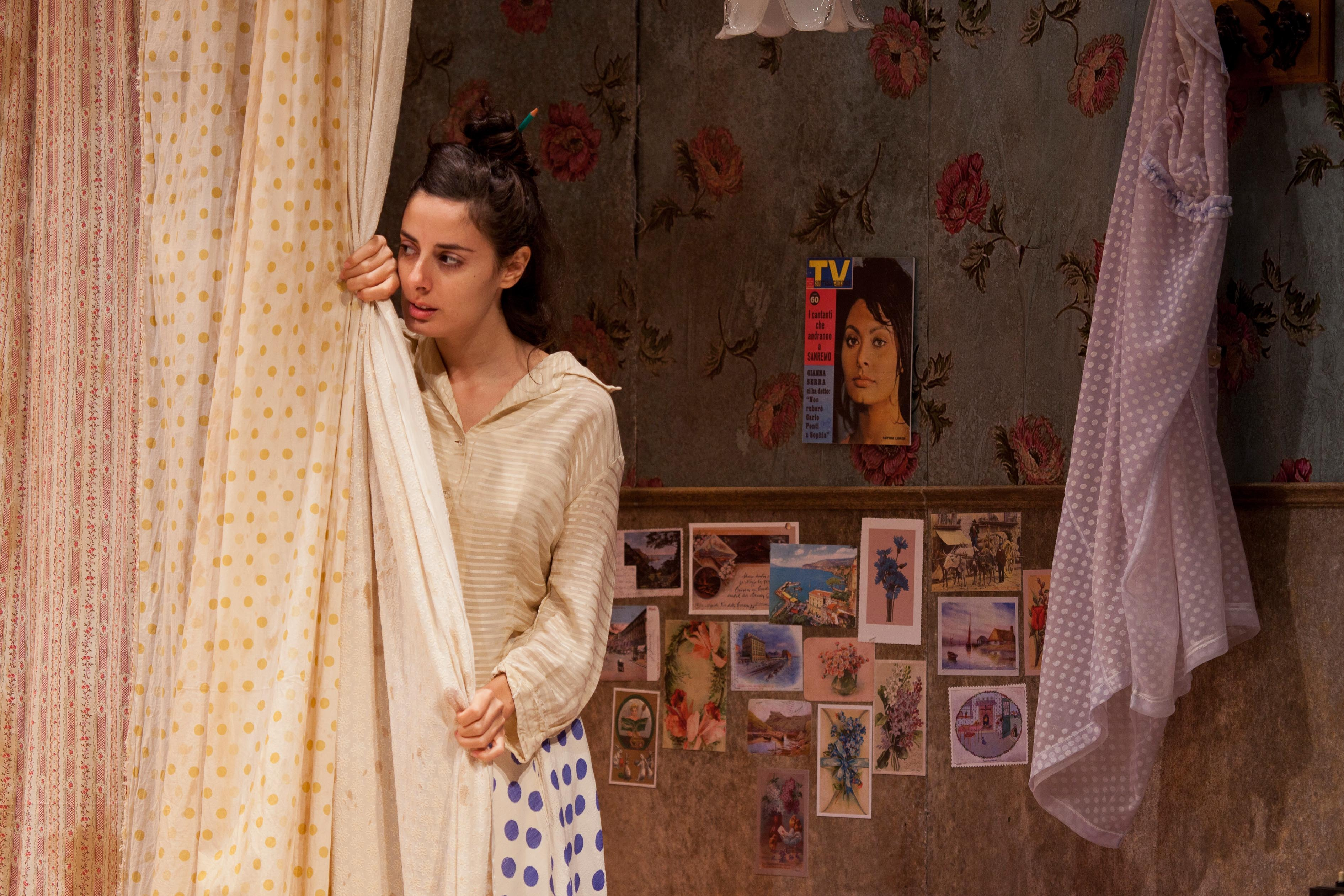 יפית אסולין פיורלה מההצגה "קויאר ועדשים"